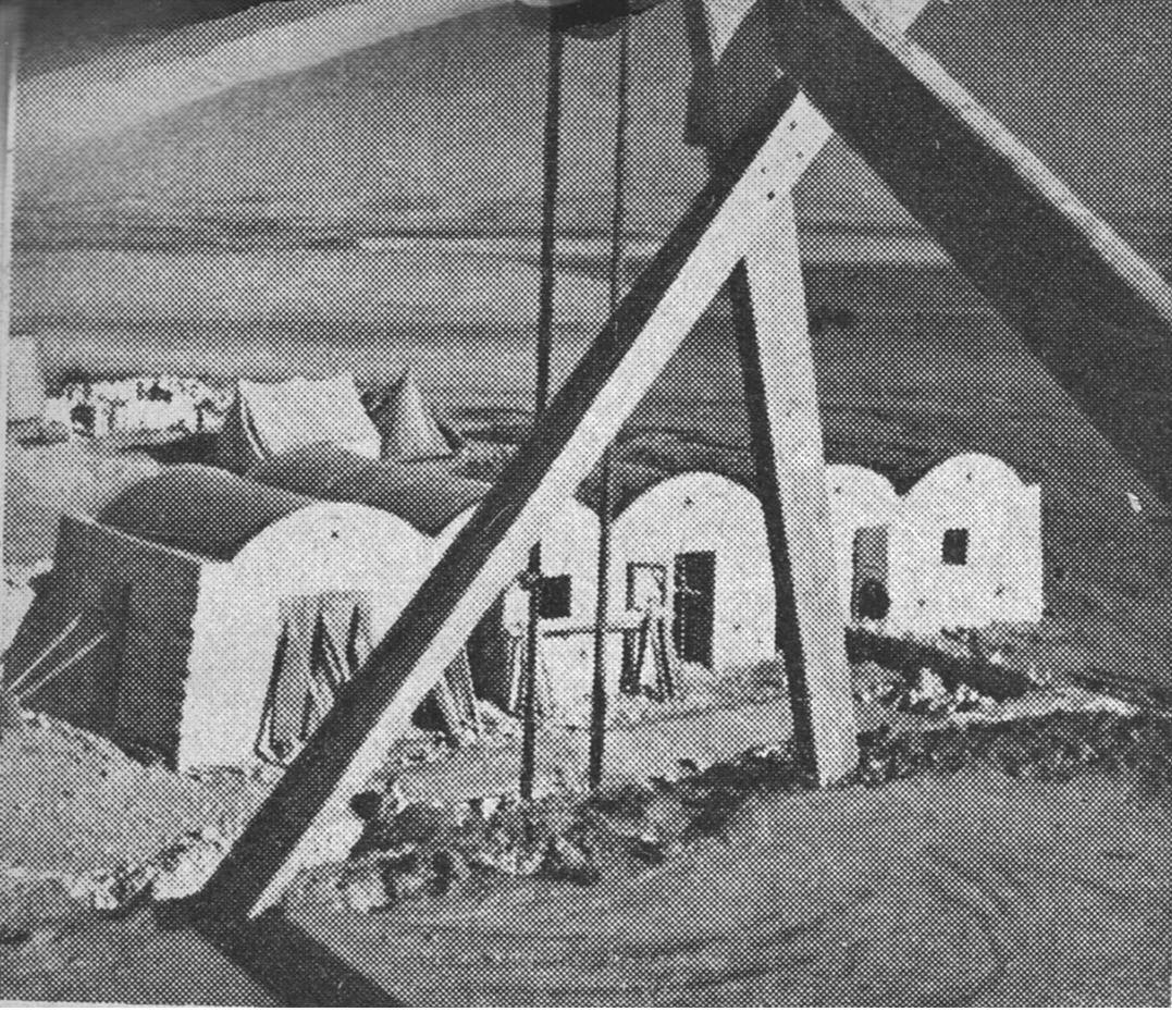 מצפה בית אשל בנגב, בסמוך לעלייתו על הקרקע